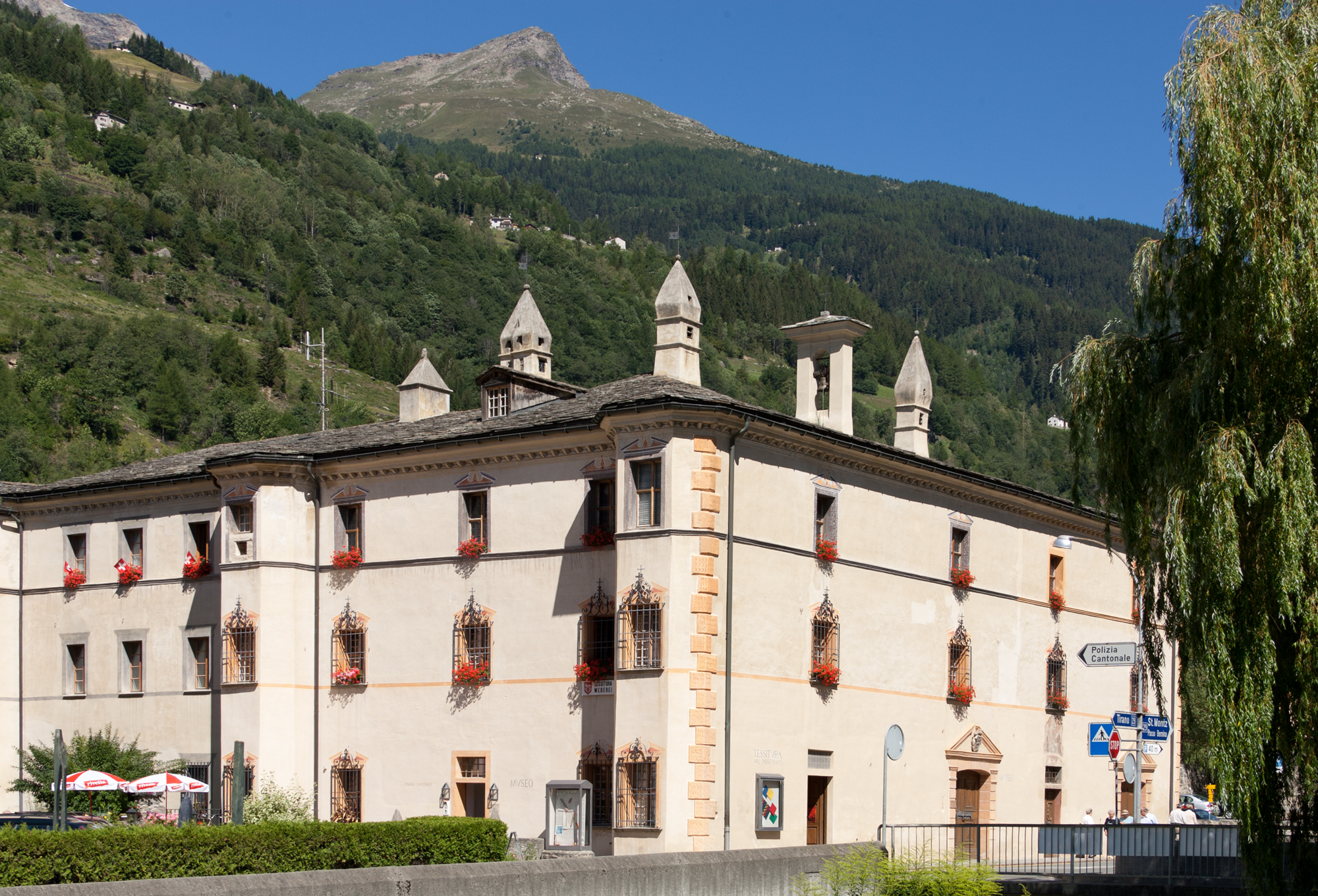 Palazzo De Bassus Mengotti (Museum) in Poschiavo